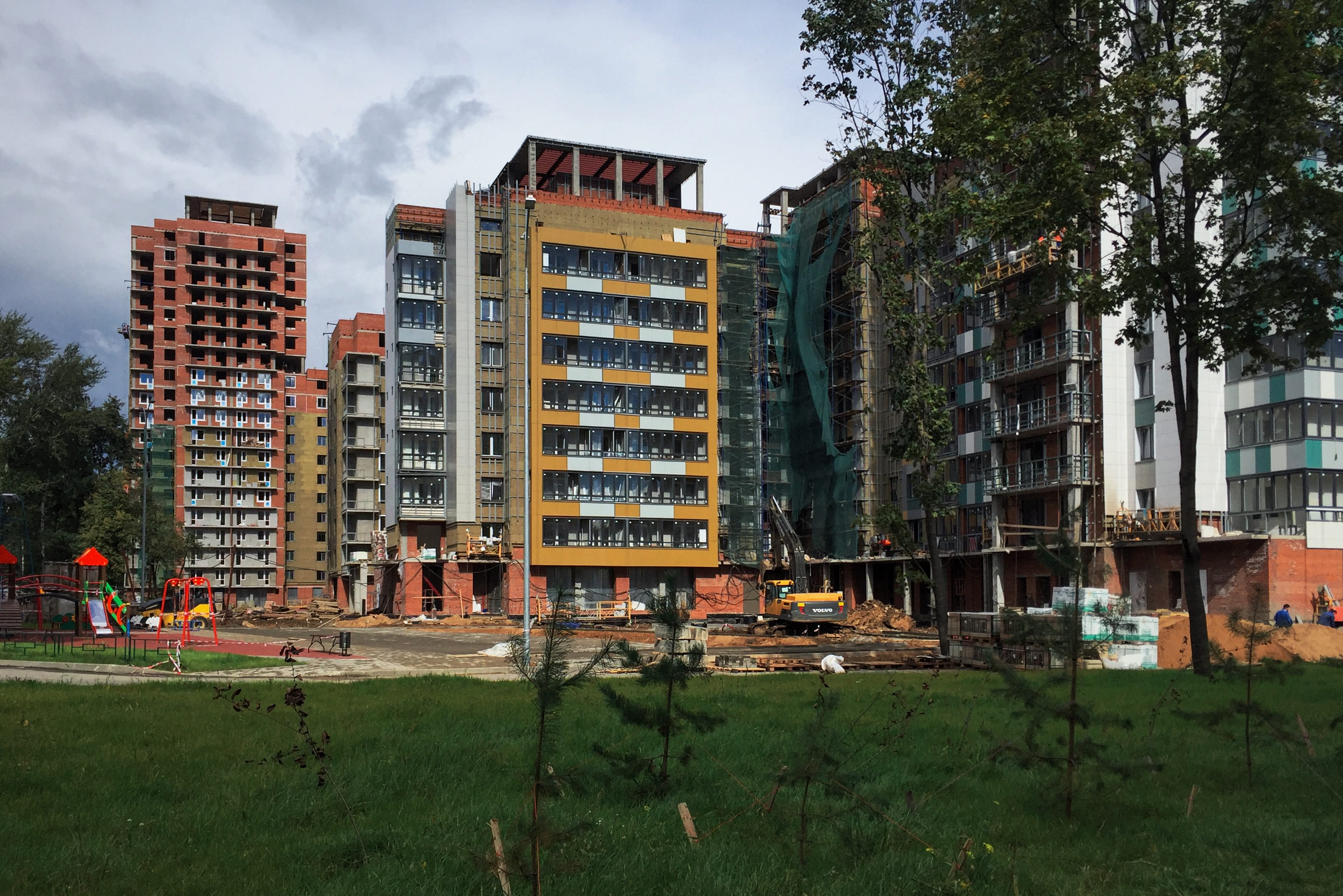 Дмитровское шоссе 68-70. Новая застройка на месте снесенных пятиэтажек Бескудникова